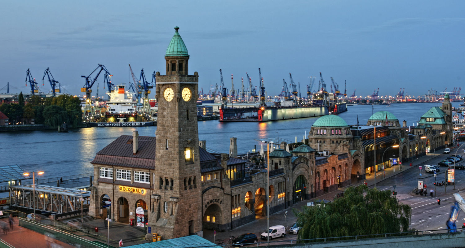 Hamburg Landungsbrücken just before sunrise